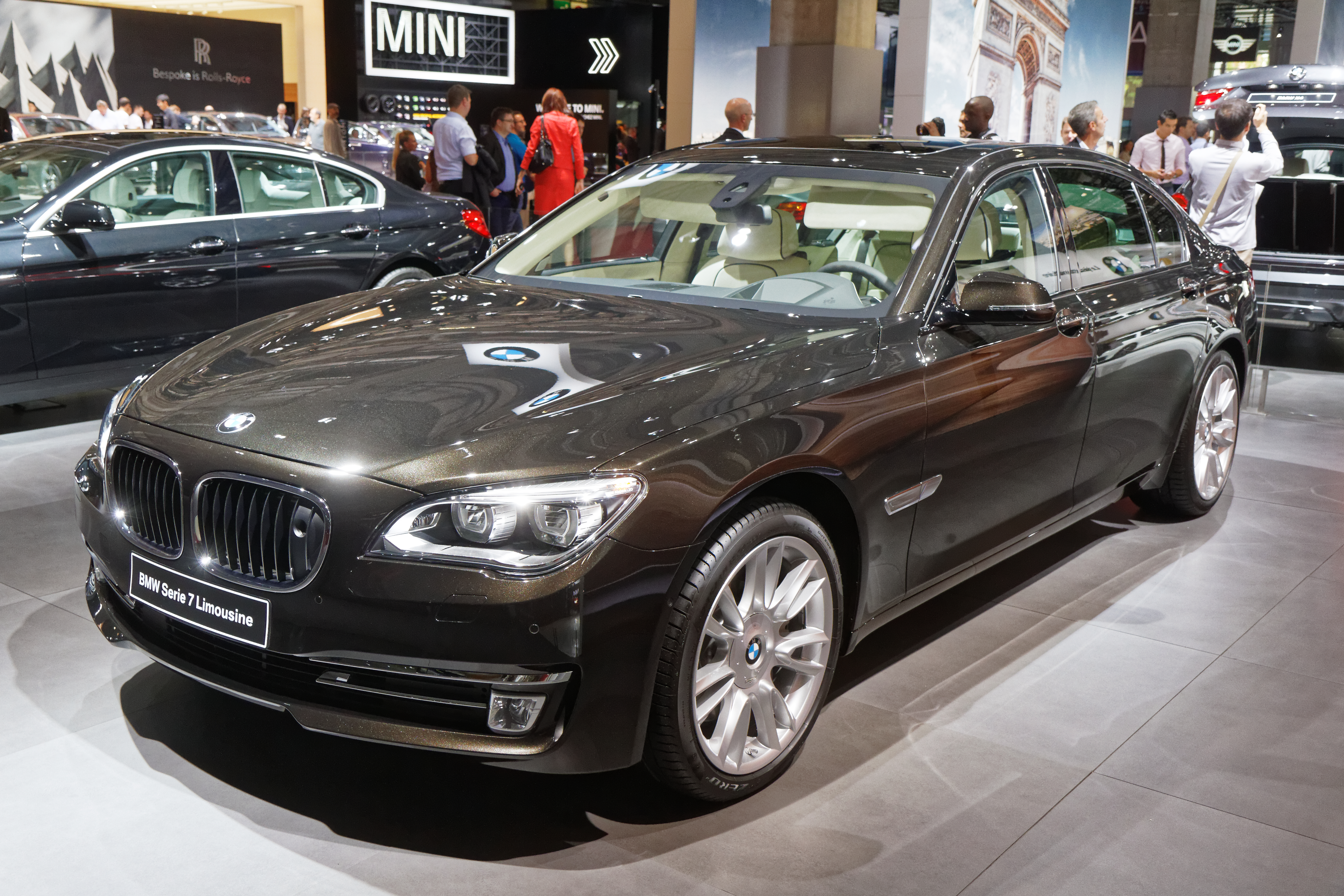 Une BMW Serie 7 Limousine présentée lors du mondial de l'automobile de Paris 2014.